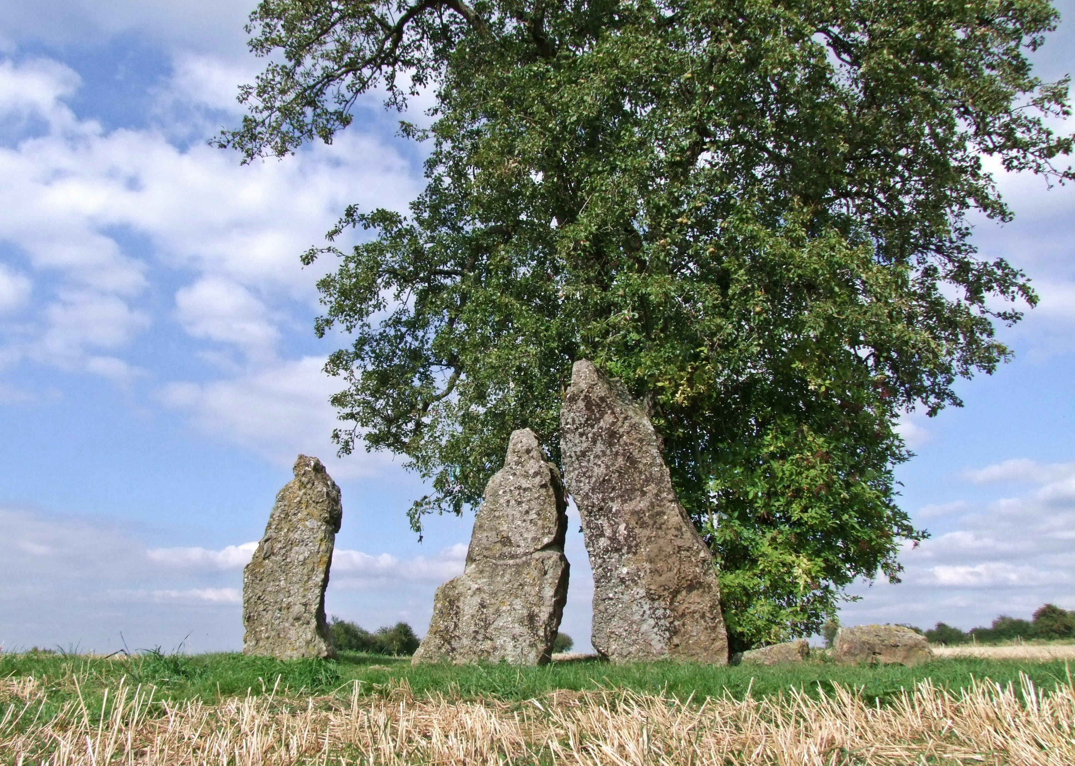 Wéris, Belgique : les menhirs d'Oppagne